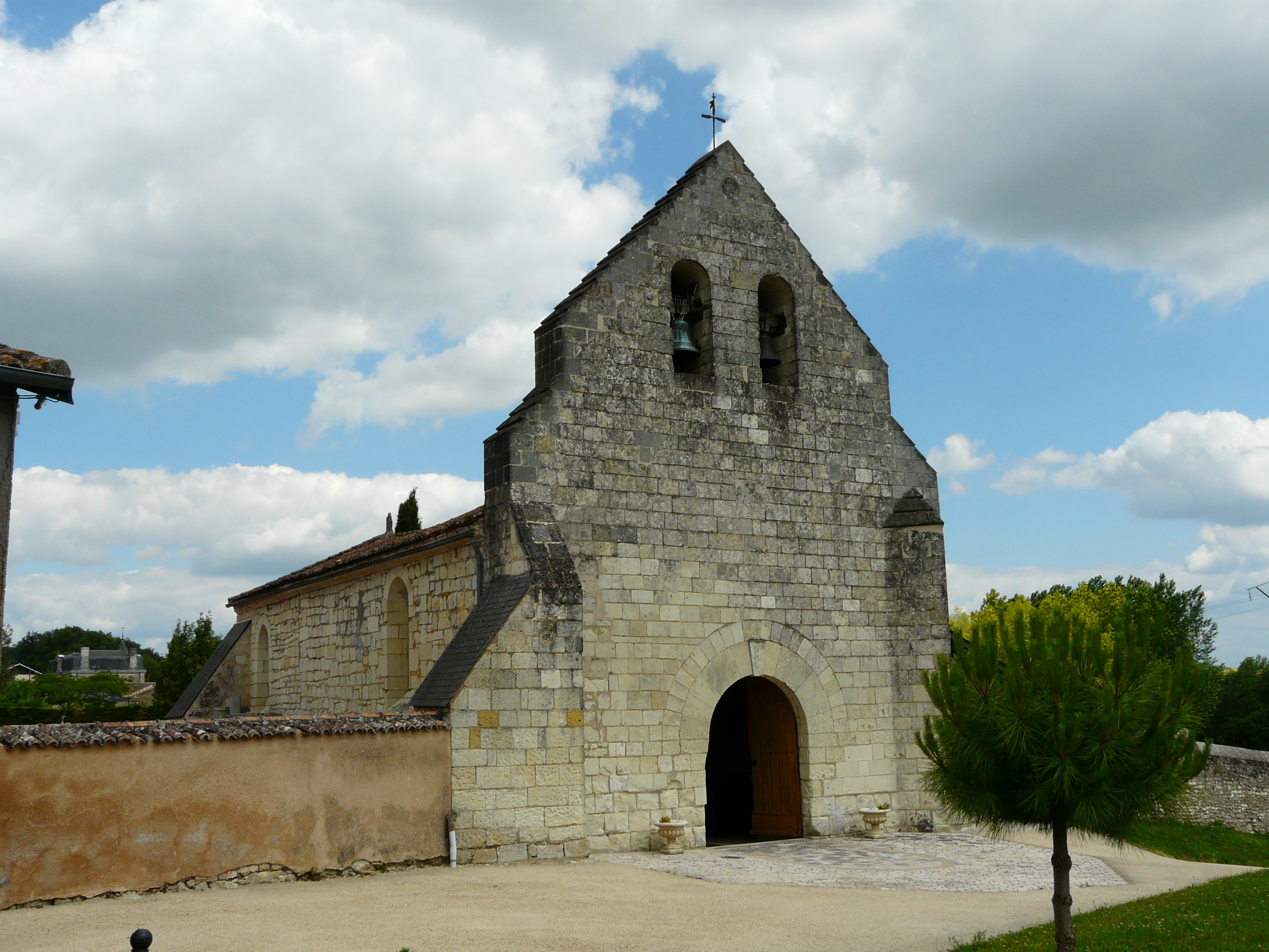 L'église Notre-Dame de Glénouze, Vienne, France